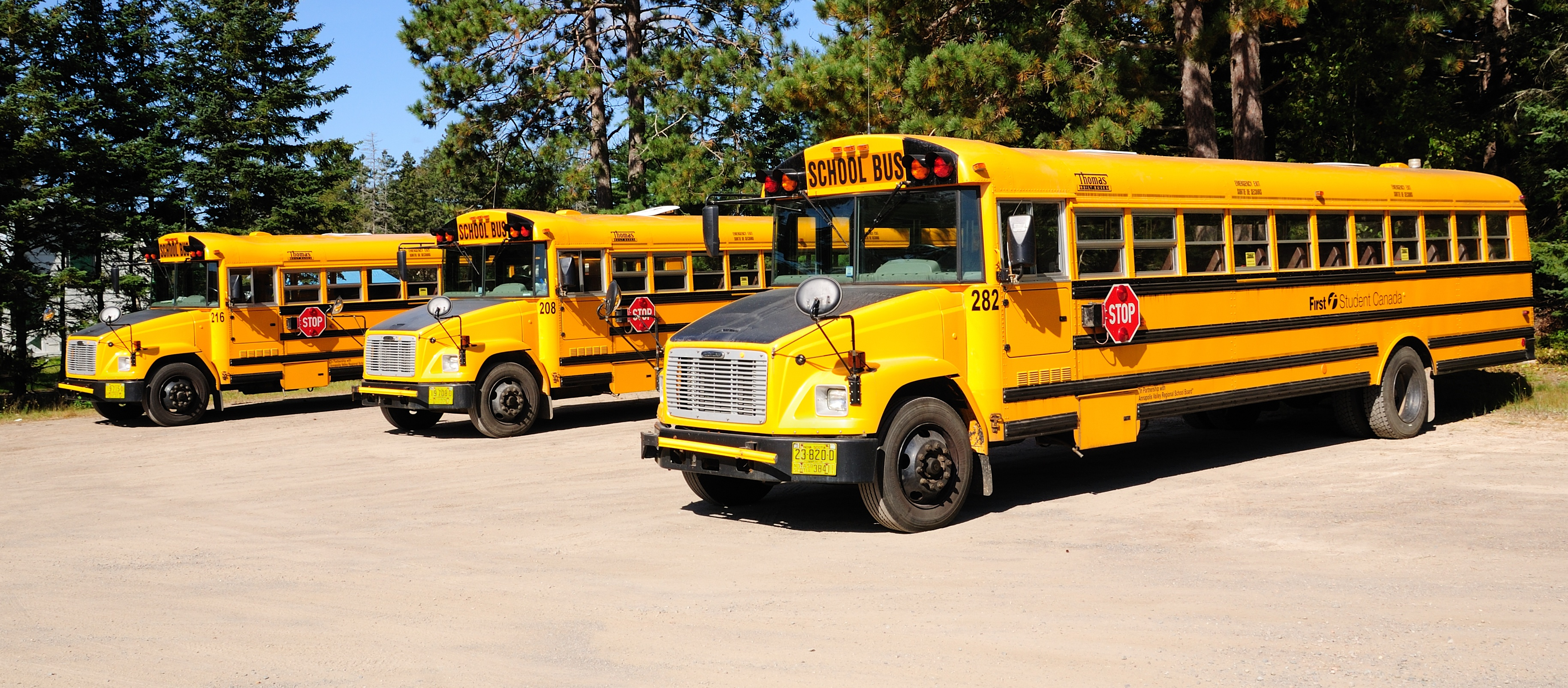 Schulbusflotte Thomas Freightliner